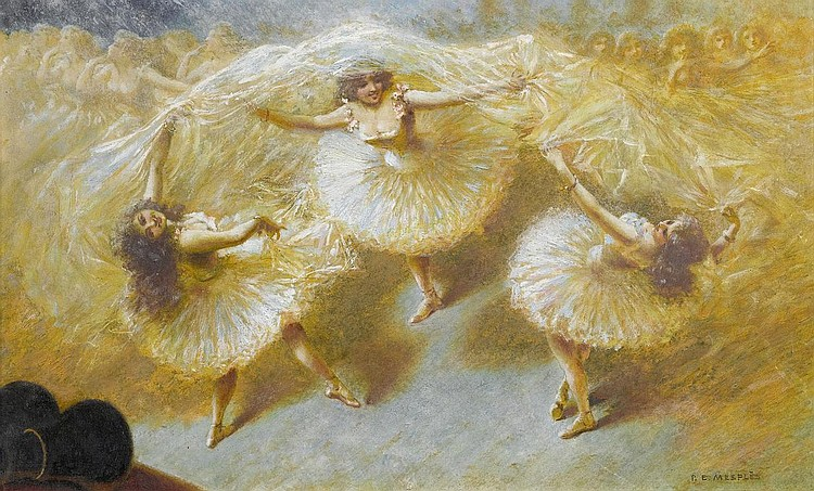 Vus par en haut, vus par en bas